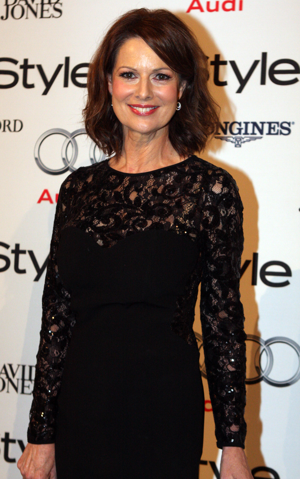 Ann Sanders